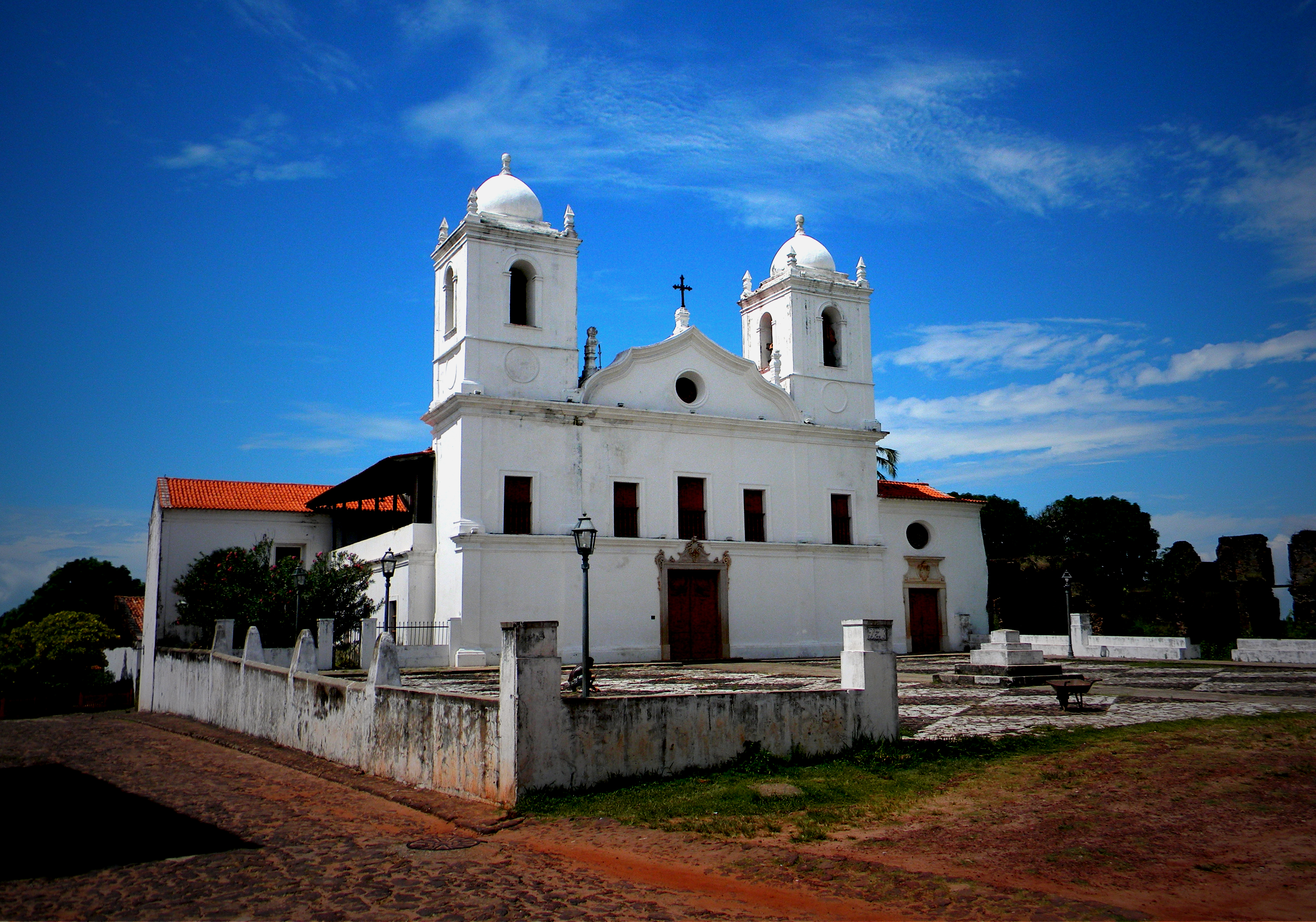 Alcântara, MA: conjunto arquitetônico e urbanístico